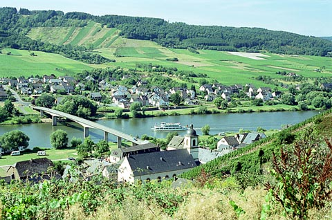 Blick auf Kindel